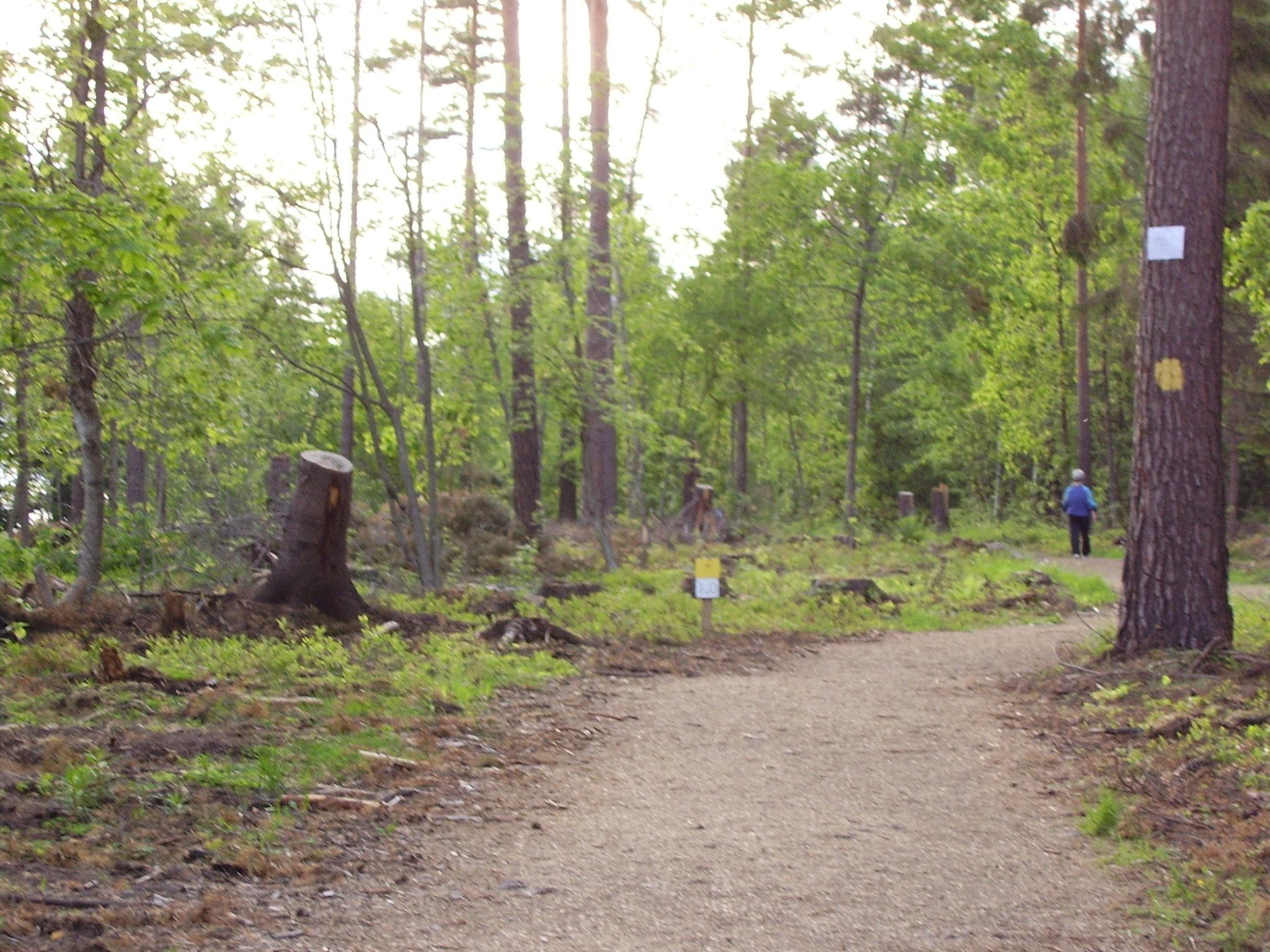 Foto:Lavas.